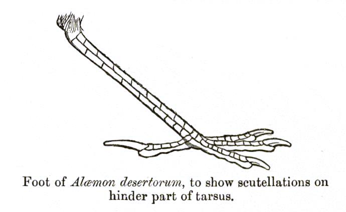 Tarsus of Alaemon alaudipes